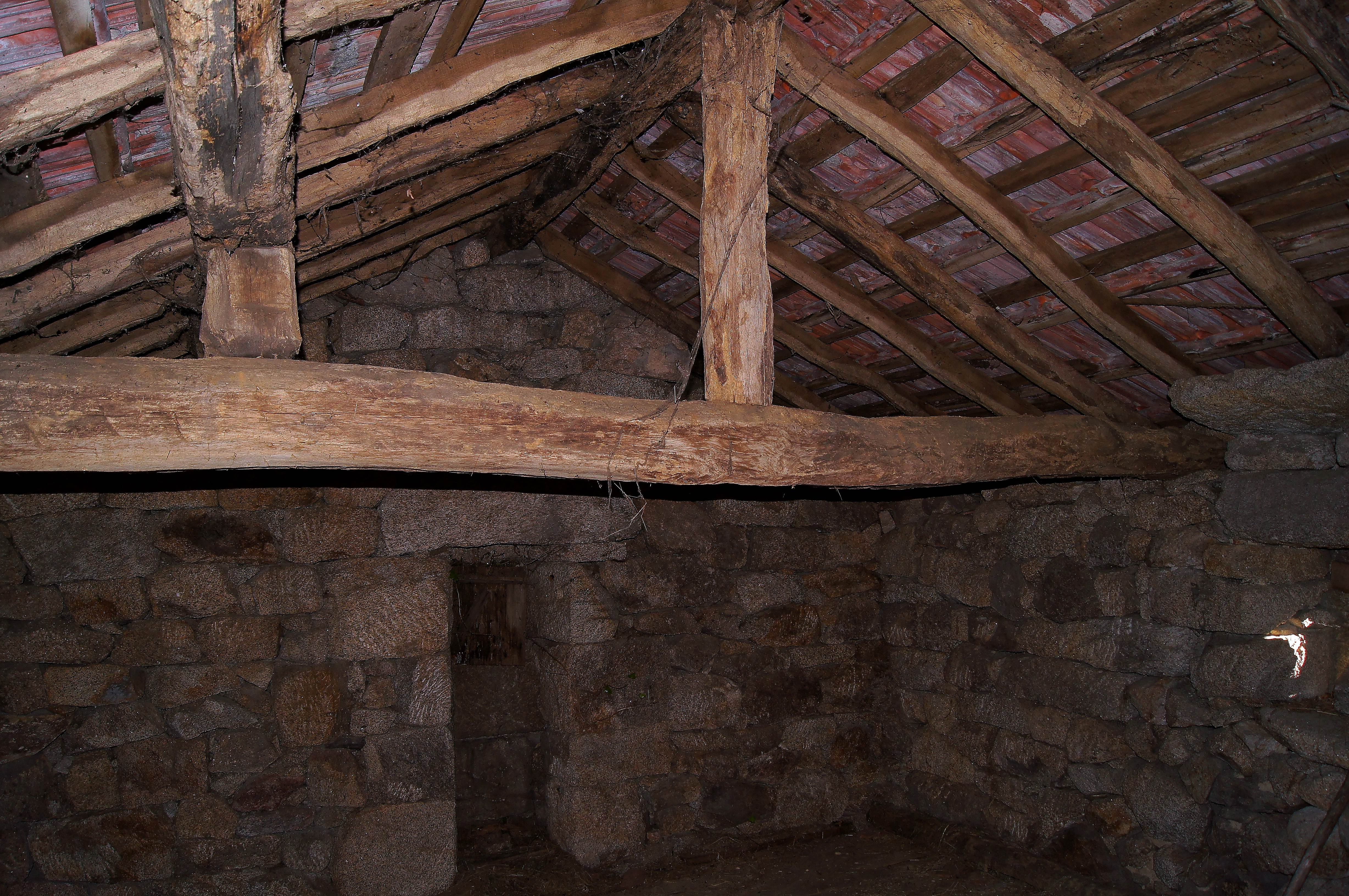 Trabe